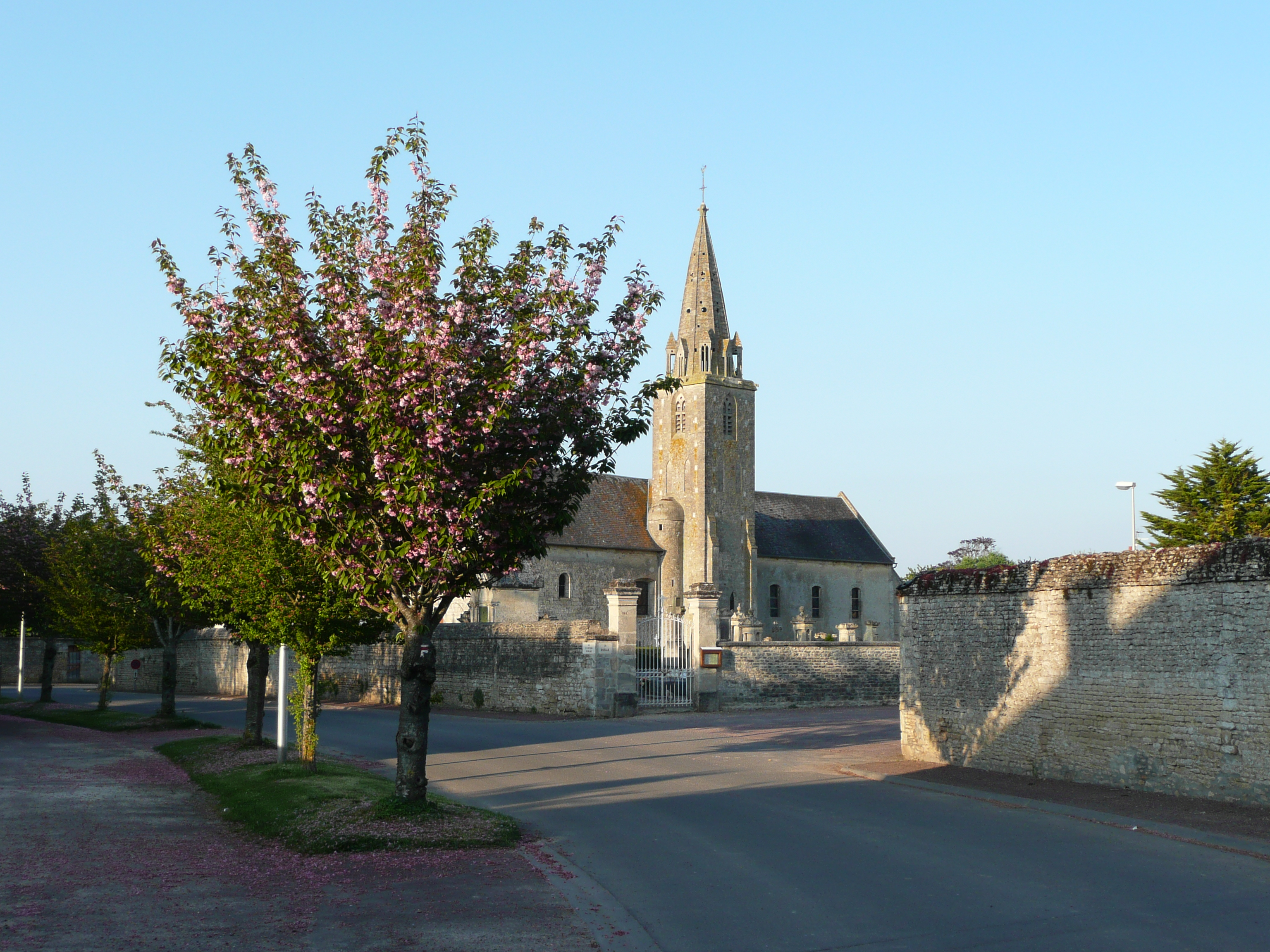 Eglise St Pierre de Lasson (Calvados France)